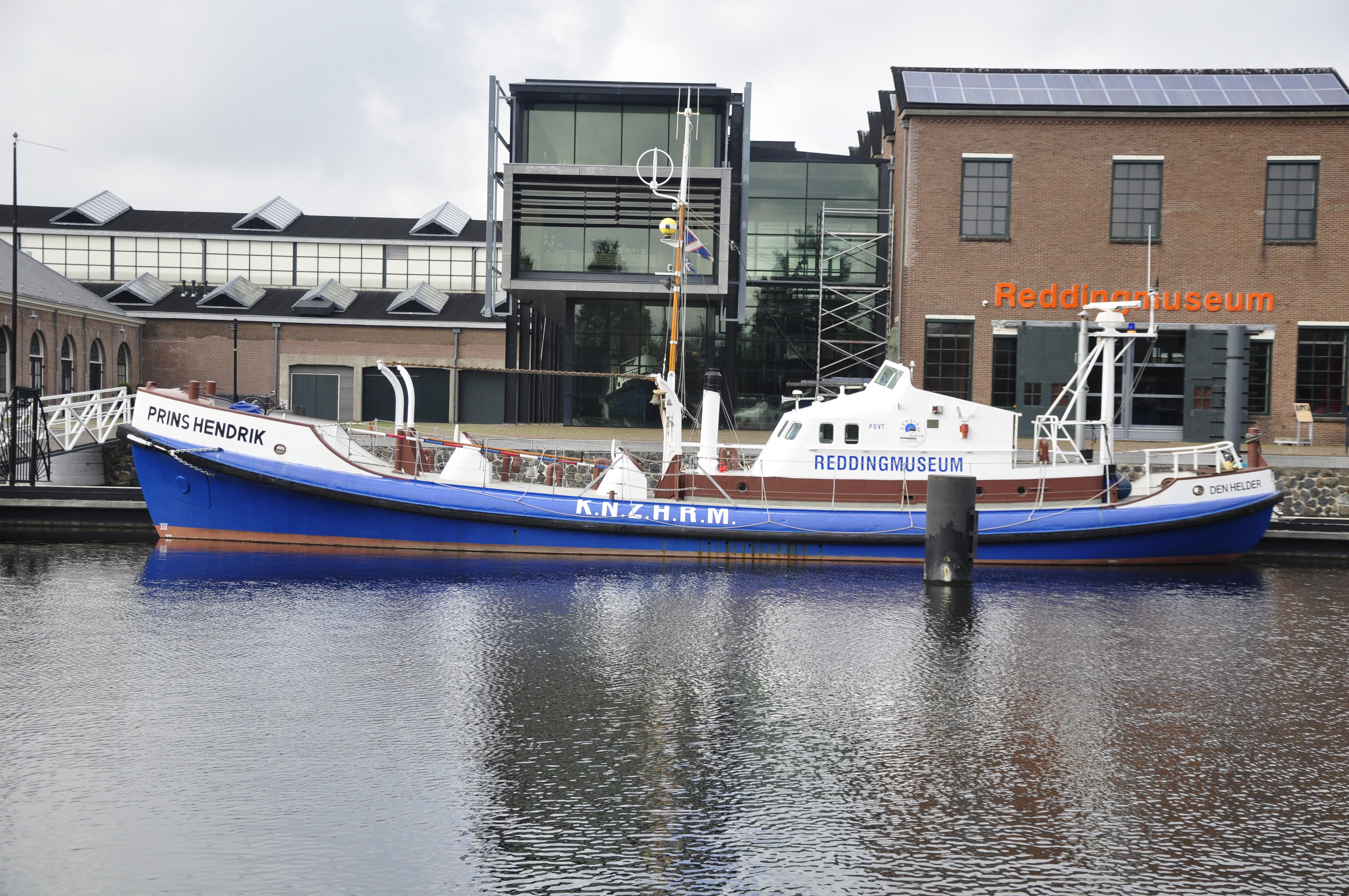 Den Helder, Rettungsschiff, Rettungsmuseum